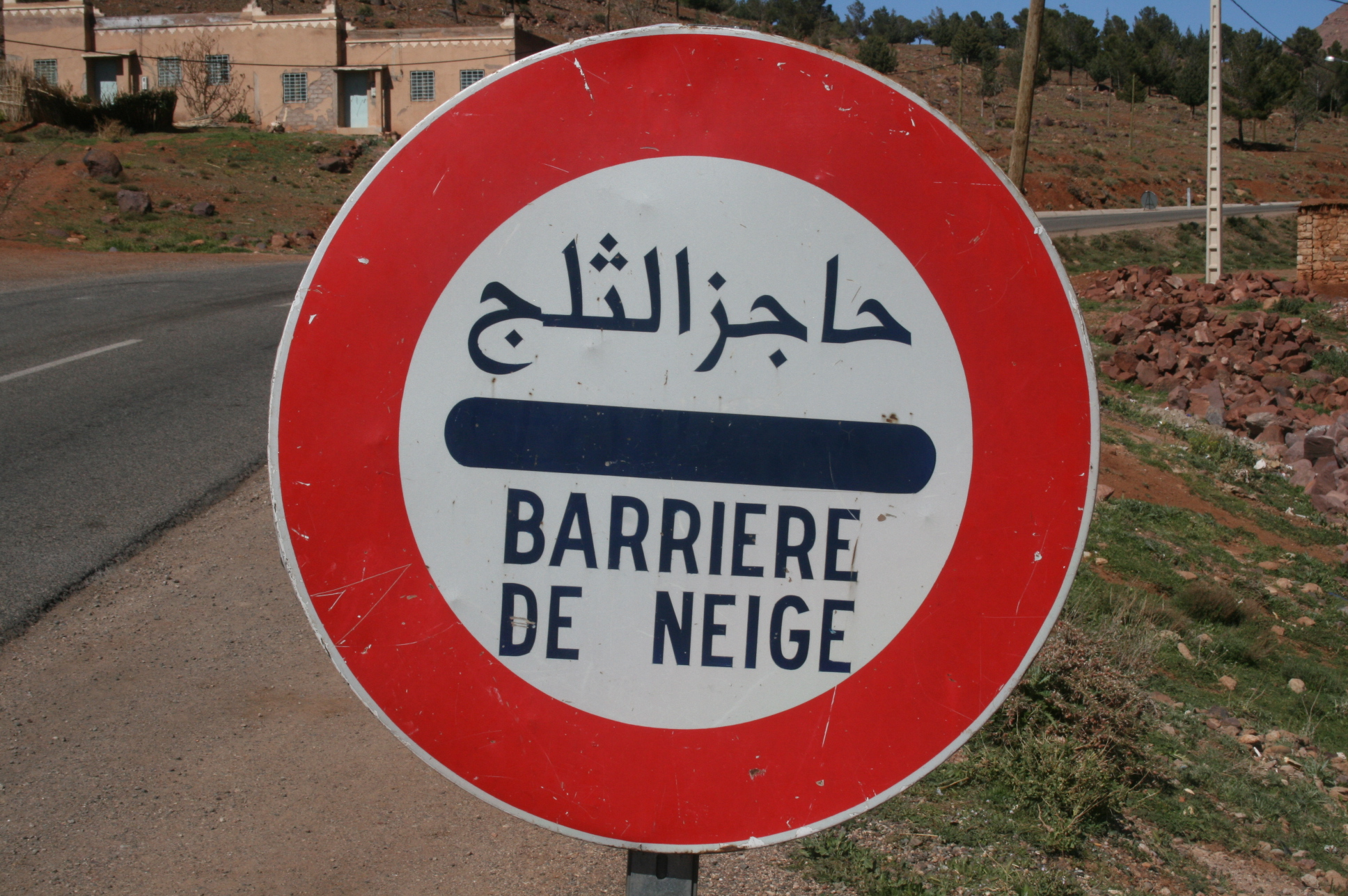 Panneau de signalisation d'une barrière de neige dans le moyen Atlas au Maroc.